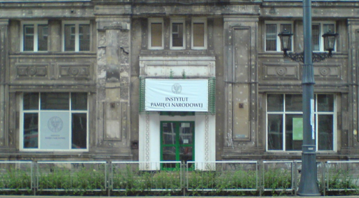 PL, Warszawa, Instytut Pamięci Narodowej, budynek przy ul. Marszałkowskiej 21/25